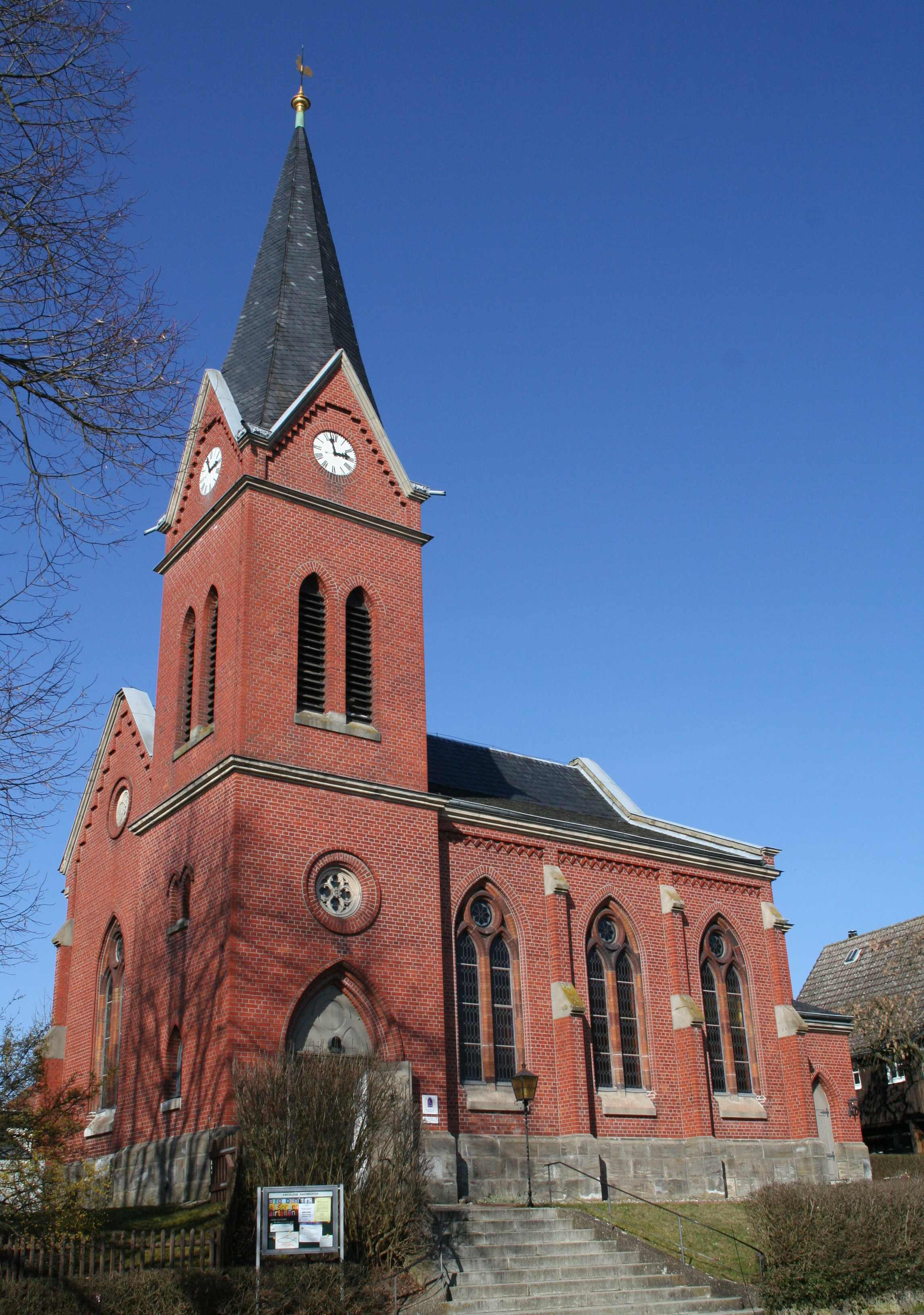 evangelische Kirche in Wiesenfeld, Gemeinde Meeder, Landkreis Coburg